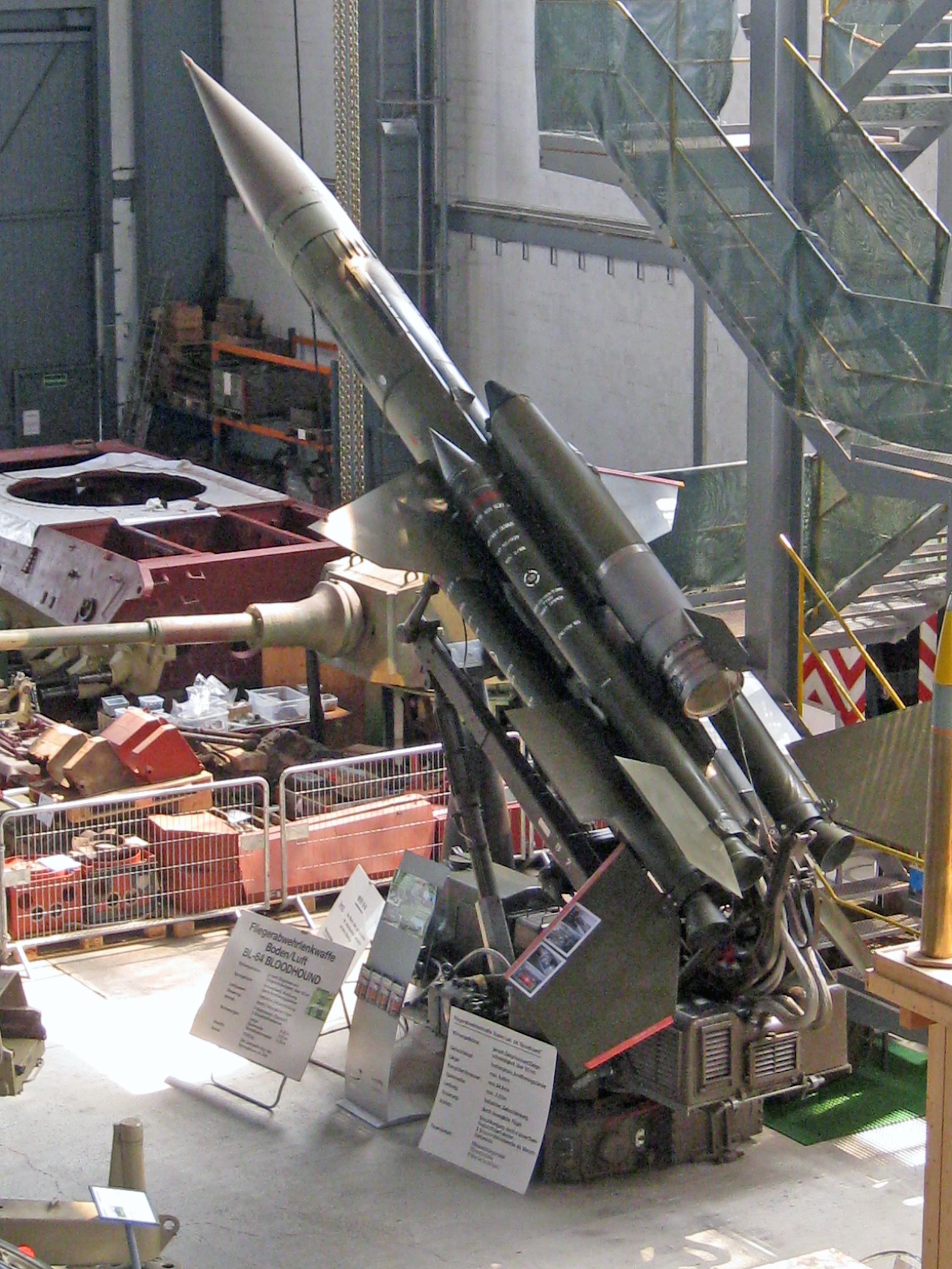 Lenkwaffe Bloodhound mit Werfer im Militärmuseum Full